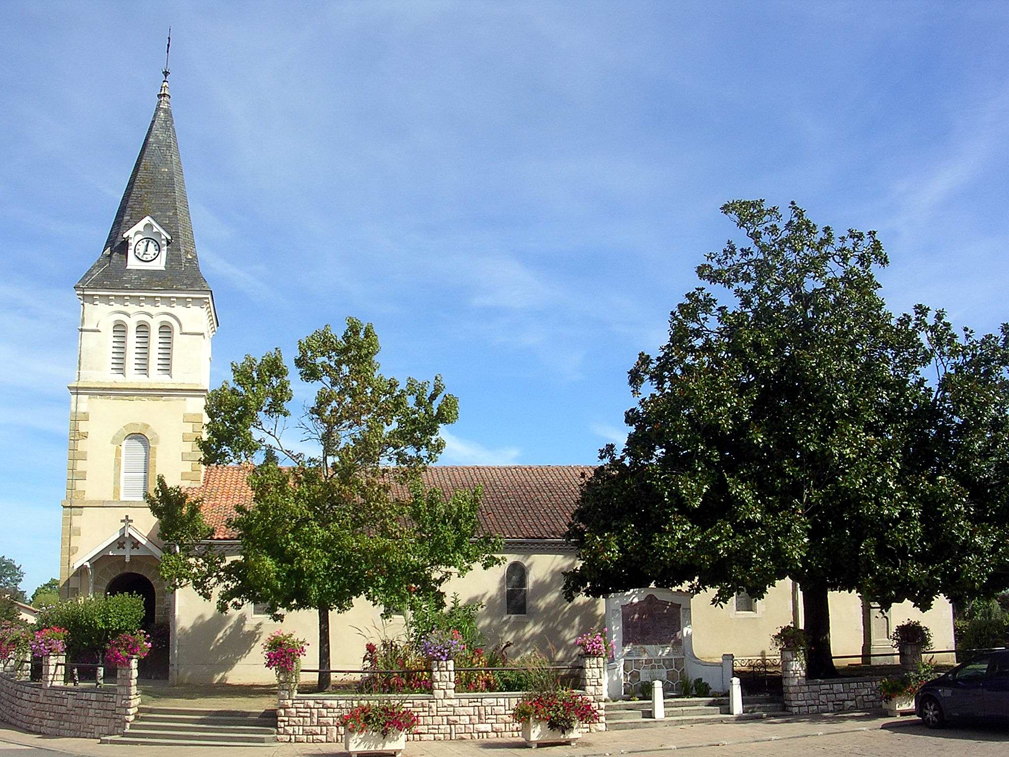 Eglise du bourg d'Aurice, dans le département français des Landes